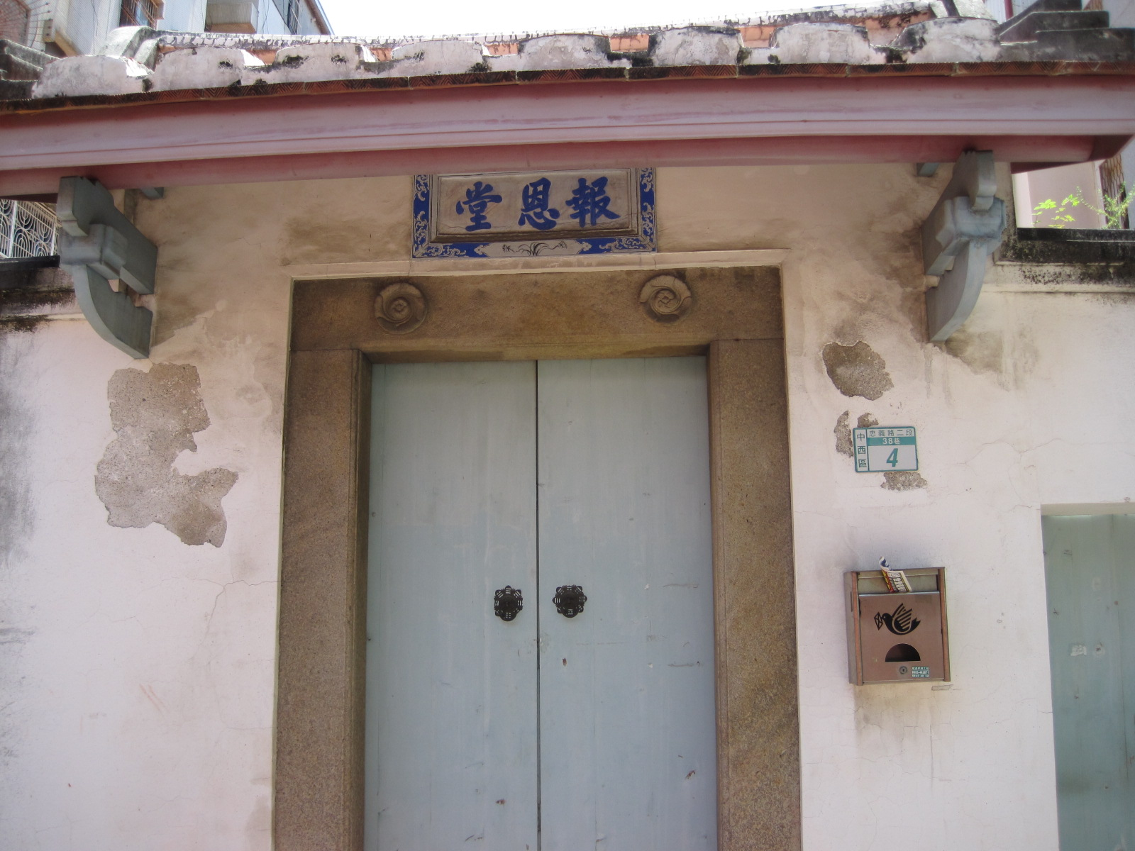 臺南報恩堂大門，右側釘掛門牌號碼與信箱。